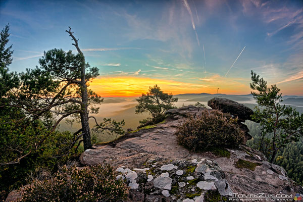 Las Palatyński z góry Heidenberg